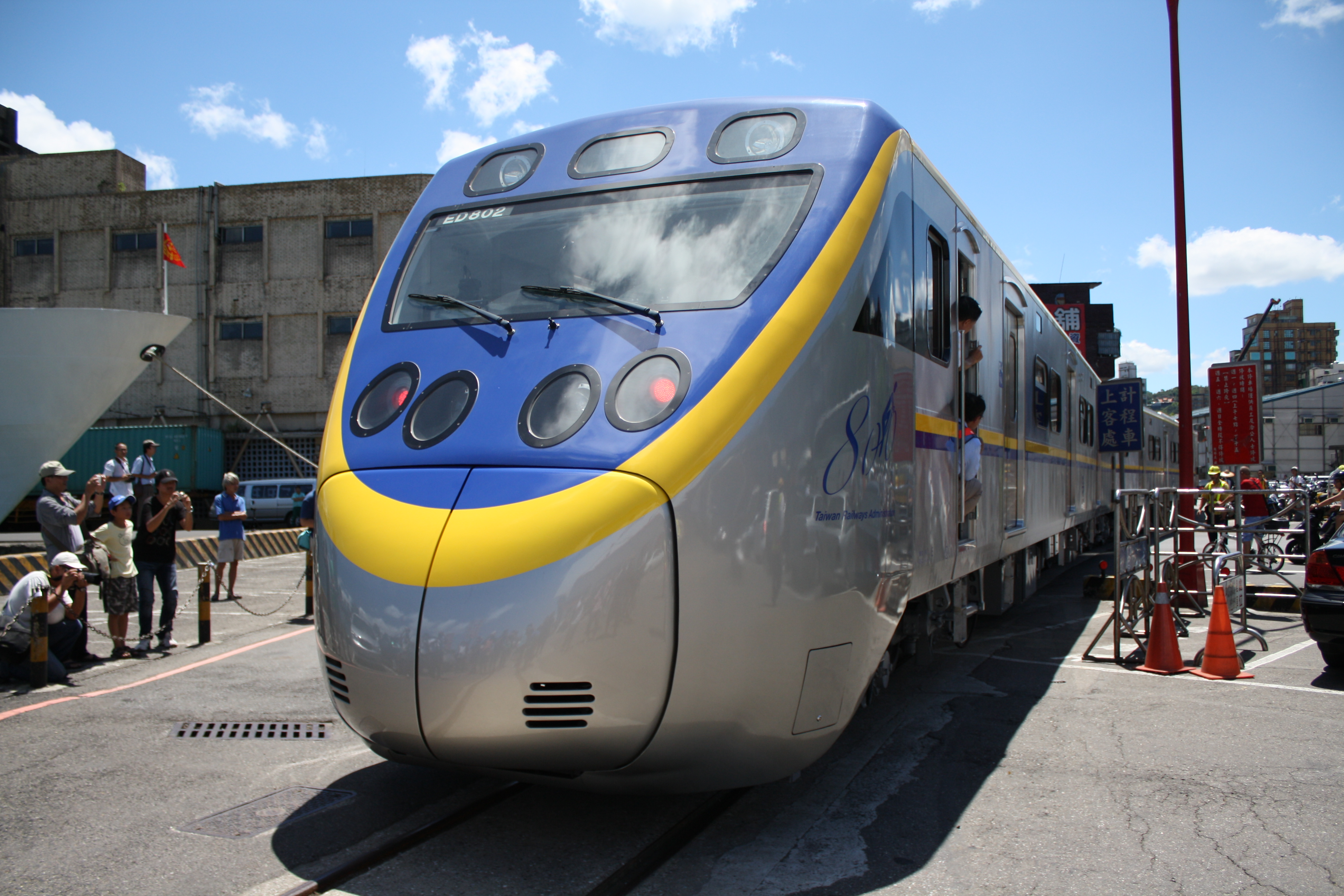 台灣鐵路管理局採購之EMU800列車（日本車輛示範組裝版）